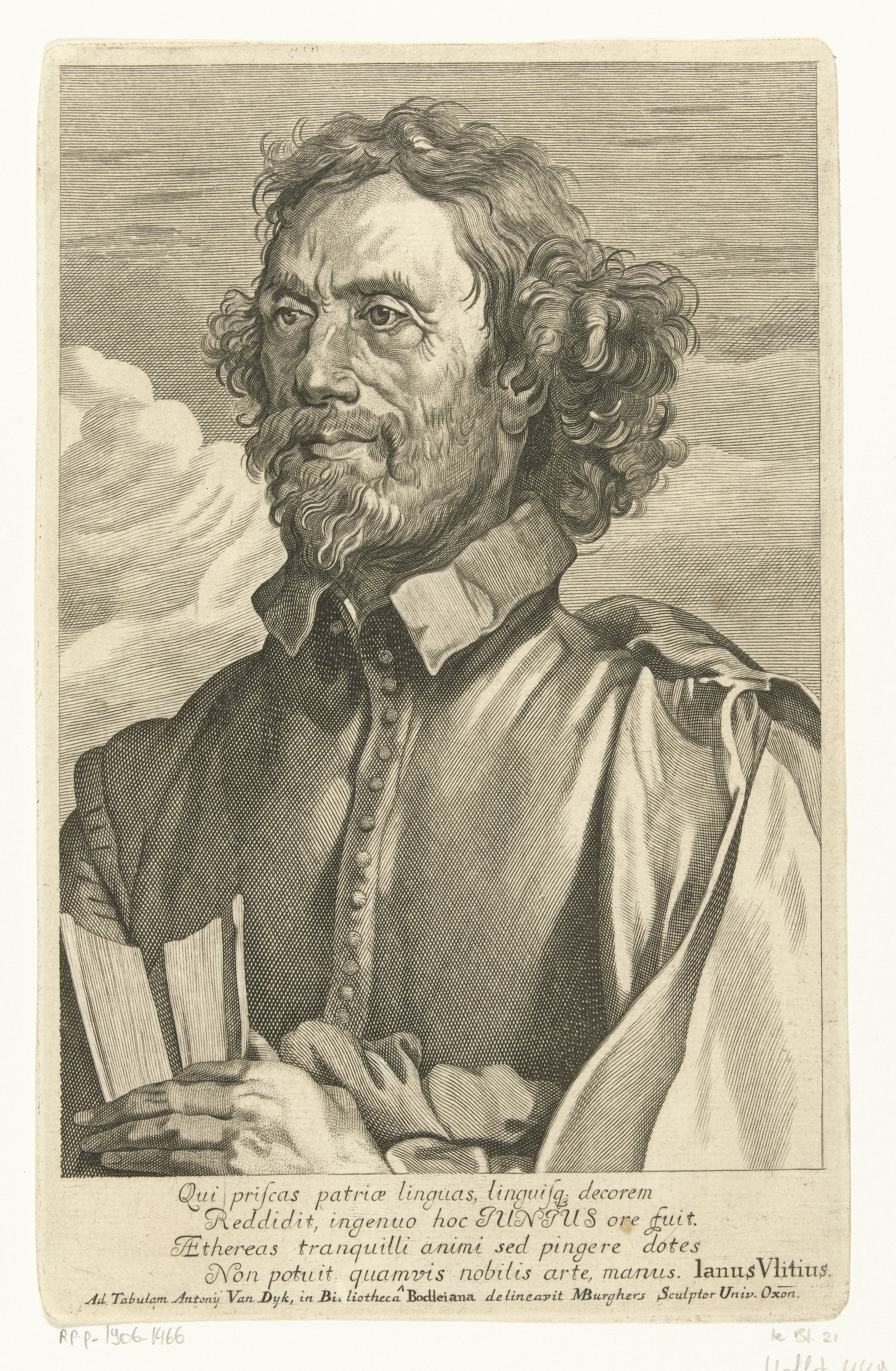 IdentificatieTitel(s): Portret van François JuniusObjecttype: prent Objectnummer: RP-P-1906-1466Catalogusreferentie: Hollstein Dutch 449-a (kopie)Opschriften / Merken: verzamelaarsmerk, verso midden, gestempeld: Lugt 2228Omschrijving: Portret van de filoloog François Junius, ten halven lijve, naar links gekeerd. Hij heeft een boek in de handen.VervaardigingVervaardiger: prentmaker: Michael Burghers (vermeld op object)naar tekening van: Michael Burghers (vermeld op object)naar schilderij van: Anthony van Dyck (vermeld op object)schrijver: Janus Vlitius (vermeld op object)Datering: 1698Fysieke kenmerken: gravureMateriaal: papier Techniek: graveren (drukprocedé)Afmetingen: plaatrand: h 211 mm × b 133 mmToelichtingTitelpagina uit Koning Alfred, 'An. Manl. Sever. Boethi Consolationis philosophiae libri V : Anglo-Saxonice redditi ab Alfredo, inclyto Anglo-Saxonum rege / ad apographum Junianum expressos edidit Christophorus Rawlinson', Christopher Rawlinson (ed.), Oxford, Sheldonian Theatre press,, 1698.OnderwerpWie: Franciscus Junius (II)Verwerving en rechtenVerwerving: aankoop 1906Copyright: Publiek domein